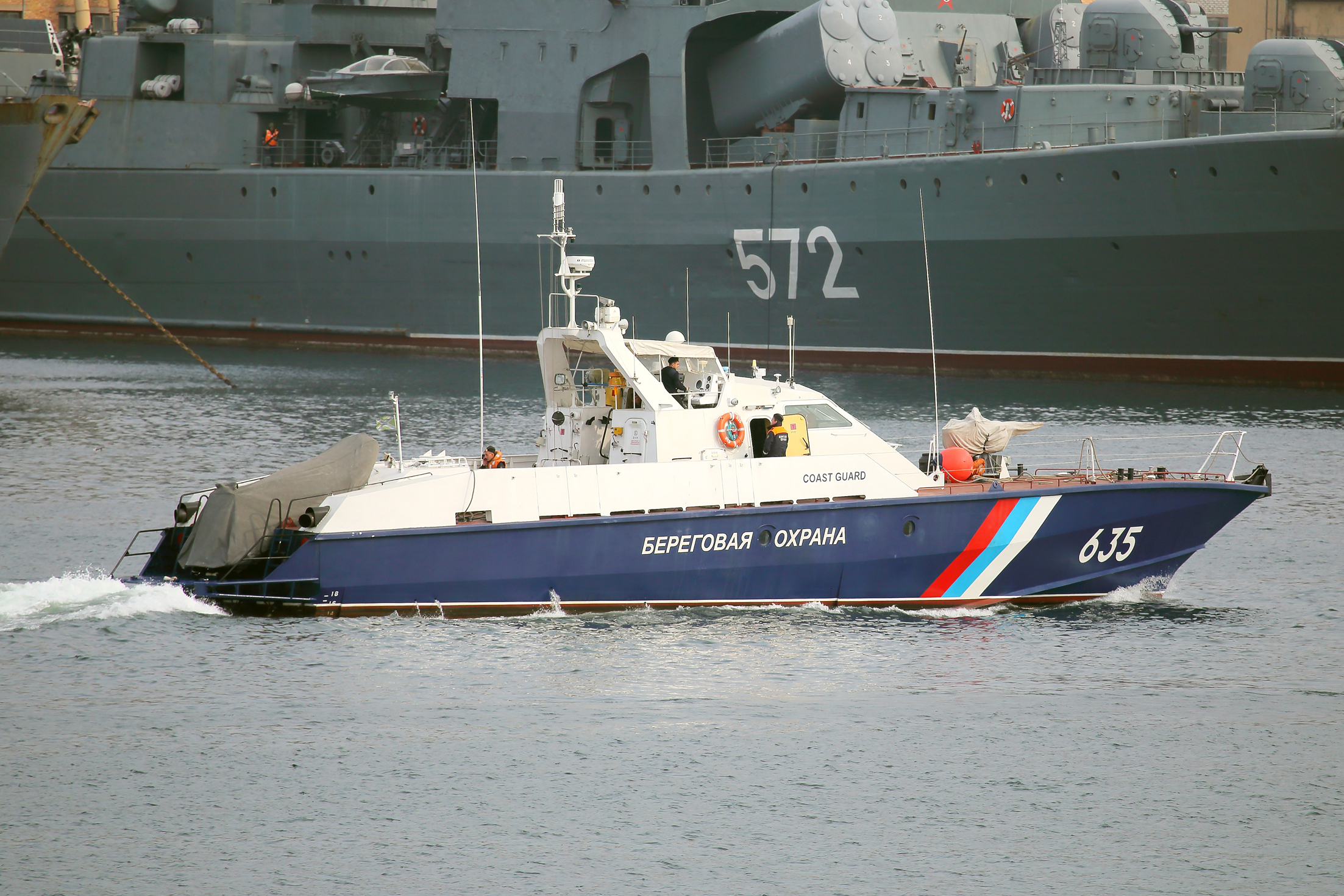 катер береговой охраны в золотом роге б/н635